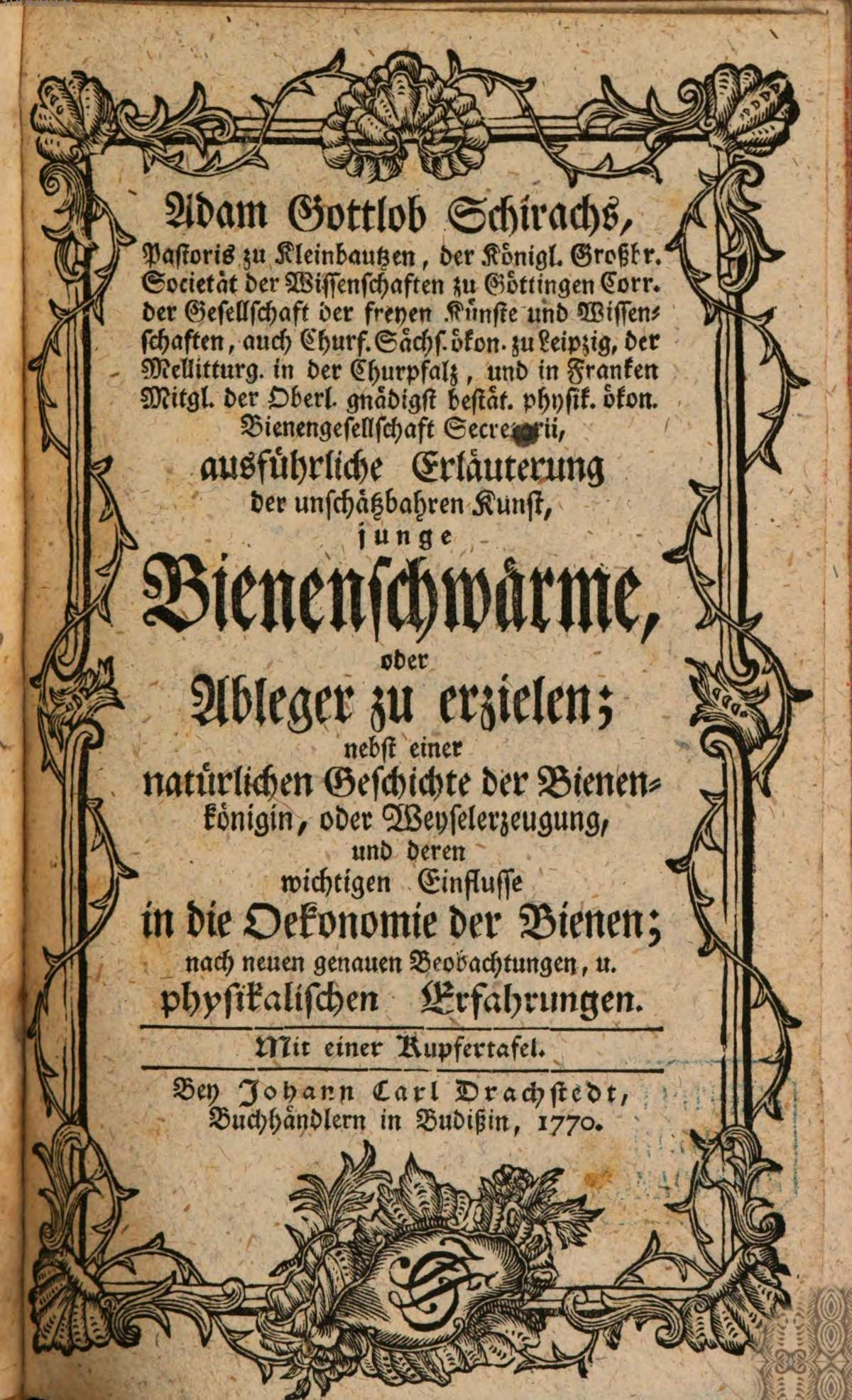 Adam Gottlob Schirachs, Pastoris zu Kleinbautzen, der Königl. Großbr. Societät der Wissenschaften zu Göttingen Corr. der Gesellschaft der freyen Künste und Wissenschaften, auch Churf. Sächs. ökon. zu Leipzig, der Mellitturg. in der Churpfalz, und in Franken Mitgl. der Oberl. gnädigst bestät. physik. ökon. Bienengesellschaft Secrtarii, ausführliche Erläuterung der unschätzbahren Kunst, junge Bienenschwärme, oder Ableger zu erzielen : nebst einer natürlichen Geschichte der Bienenkönigin, oder Weyselerzeigung, und deren wichtigen Einflusse in die Oekonomie der Bienen; nach neuen genauen Beobachtungen, u. physikalischen Erfahrungen. Budissin 1770